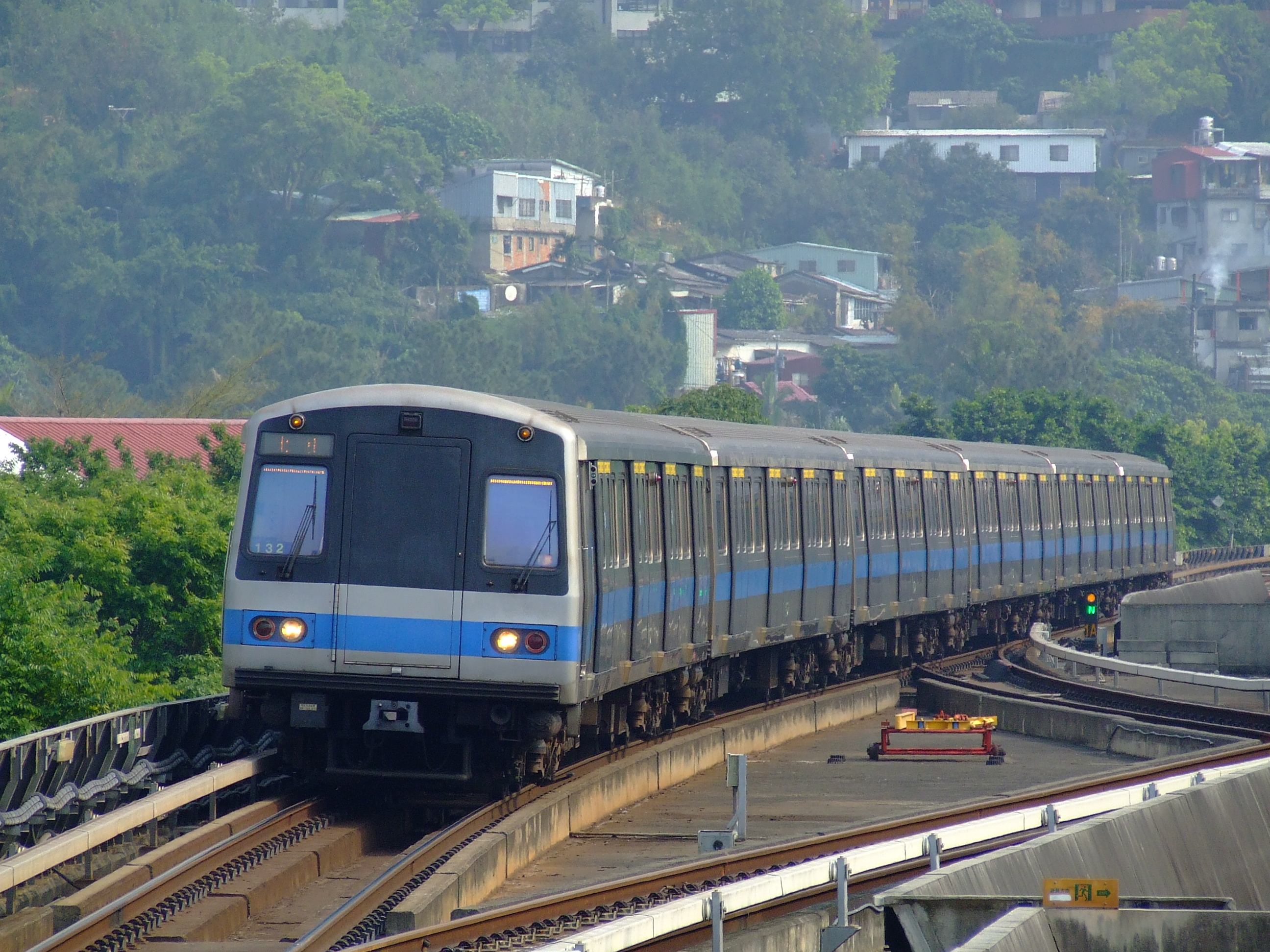 台北捷運（台北地下鉄 台湾）淡水線（たぶん川崎重工製C301系車両）